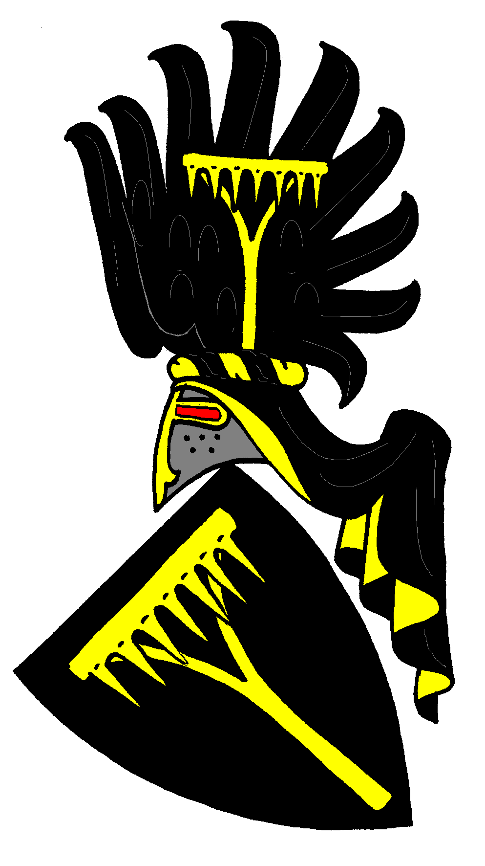 Stammwappen der Kostka von Postupitz, böhmischer Uradel